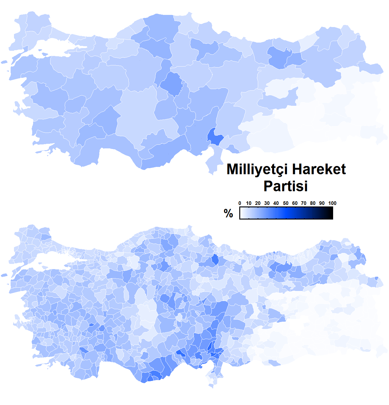 Milliyetçi Hareket Partisi'nin il ve ilçe bazında oy oranlarının yoğunluğunu gösteren harita